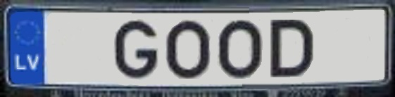 Индивидуальный автомобильный номер Латвии